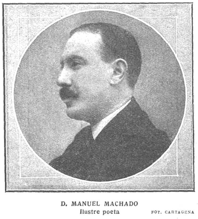 Manuel Machado ilustre poeta